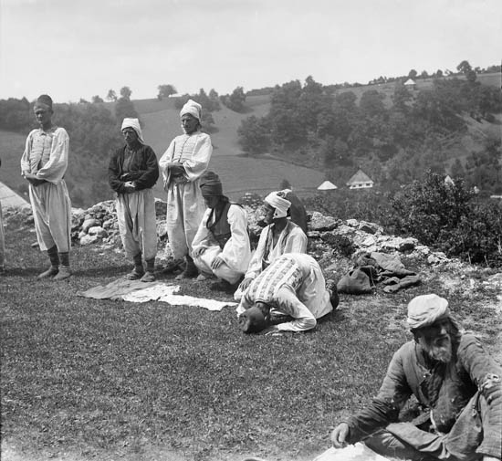 Bosna - modlitba